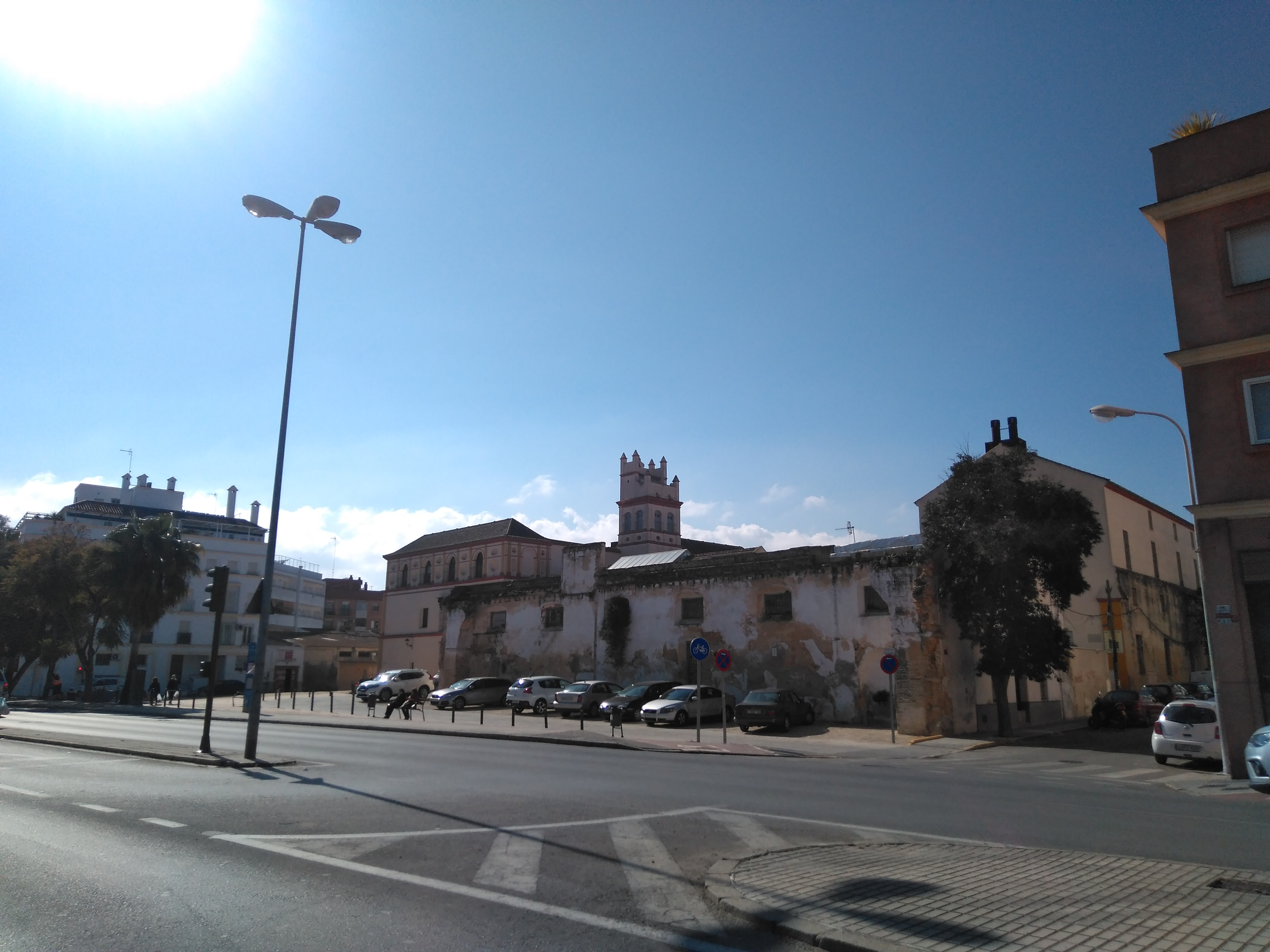 Hotel Palacio de Arizón, en la antigua "Casa de Arizón" de Sanlúcar de Barrameda (España)